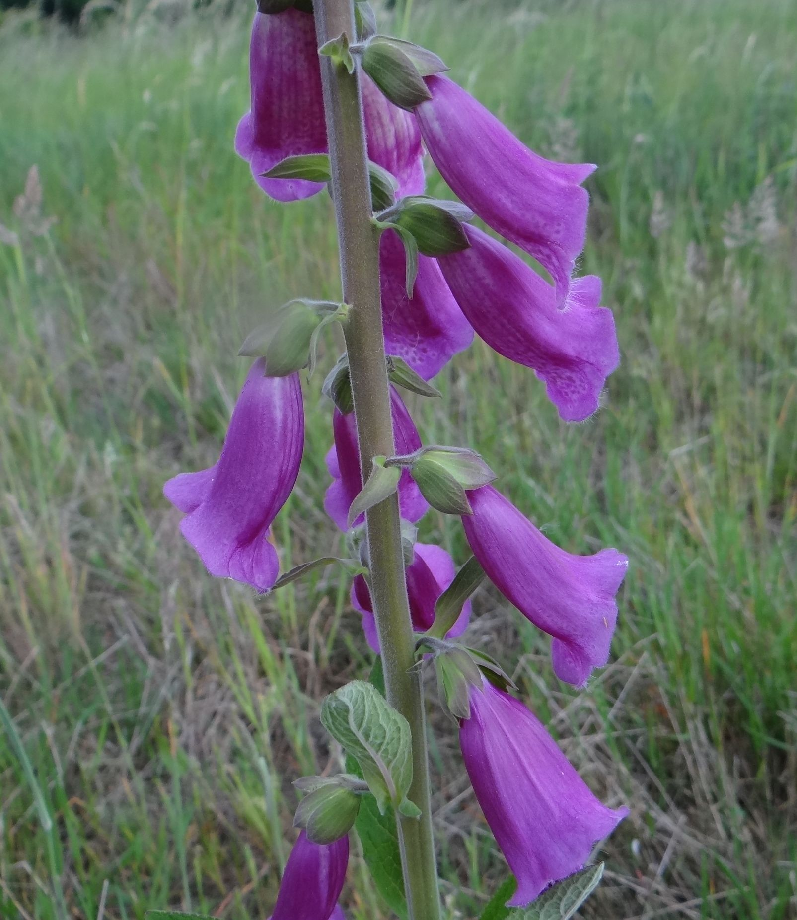 Digitalis purpurea. Location: Poland, Ryczów, województwo śląskie